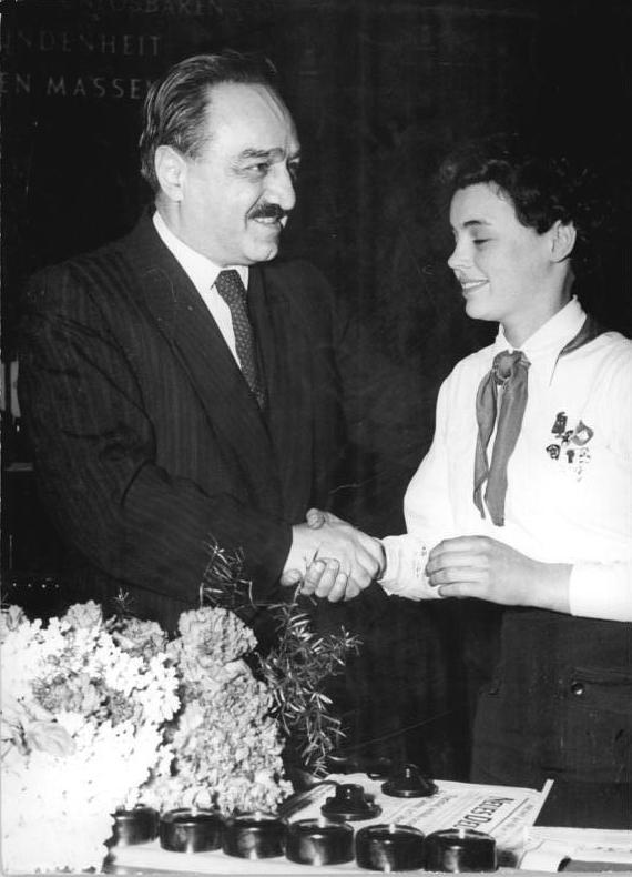 Zentralbild-Junge Zi-Ho, 6.4.1954 IV.Parteitag der Sozialistischen Einheitspartei Deutschlands, Berlin, Werner-Seelenbinder-Halle Am 6.4.1954 begrüsste eine Delegation der Pionier-Organisation "Ernst Thälmann" den Parteitag. UBz: Ein Junger Pionier begrüsst das Mitglied des Präsidiums des Zentralkomitees der KPdSU A.I. Mikojan, 6.4.1954 Stammabzug darf nicht aus dem Hause"